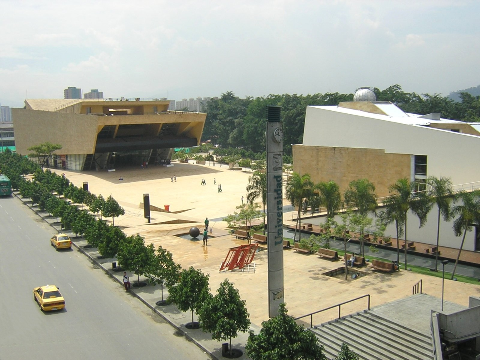 Parque de los Deseos. Medellín, Colombia.